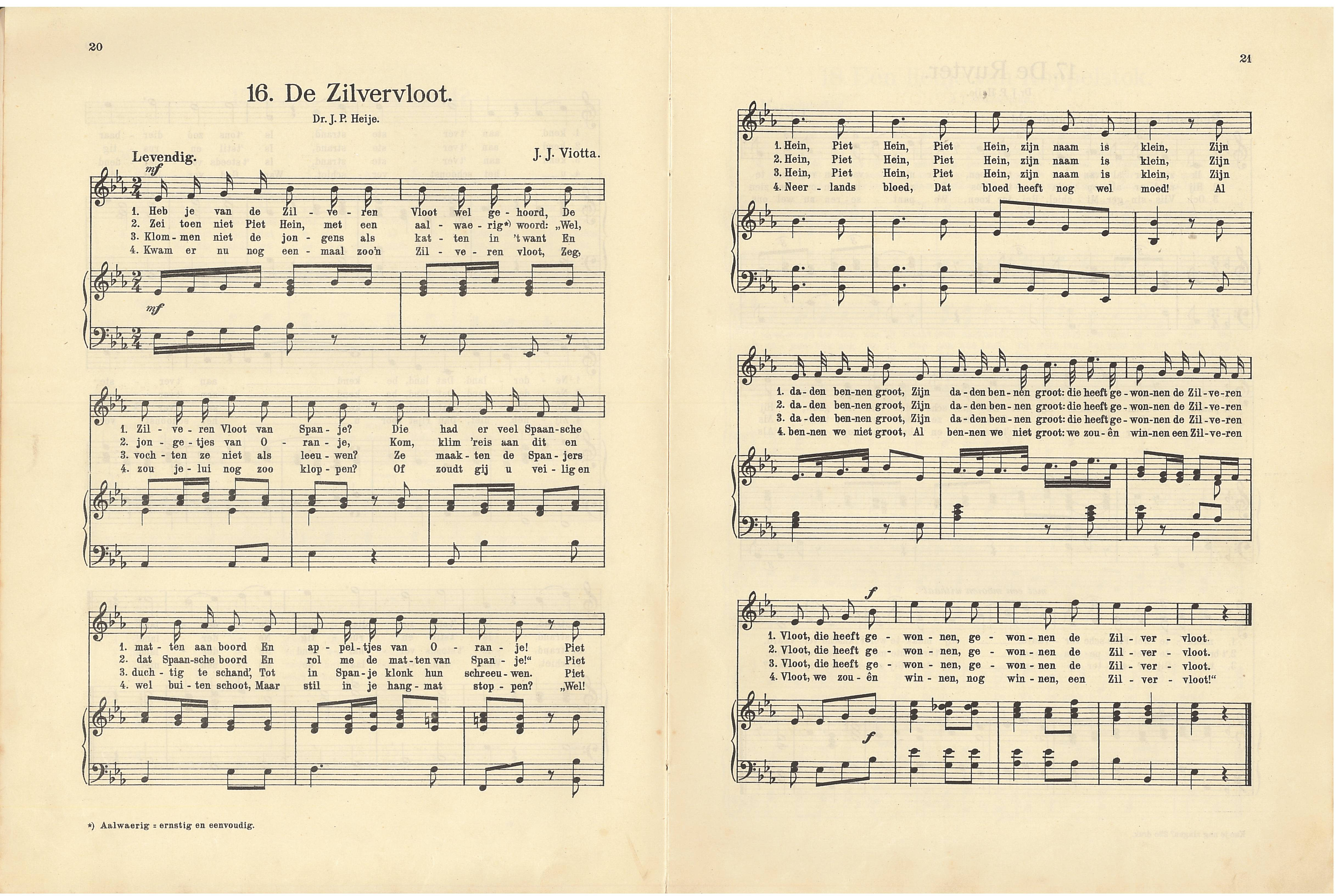 Kun je nog zingen, zing dan mee. Muziek en teksten origineel gepubliceerd voor 1900.